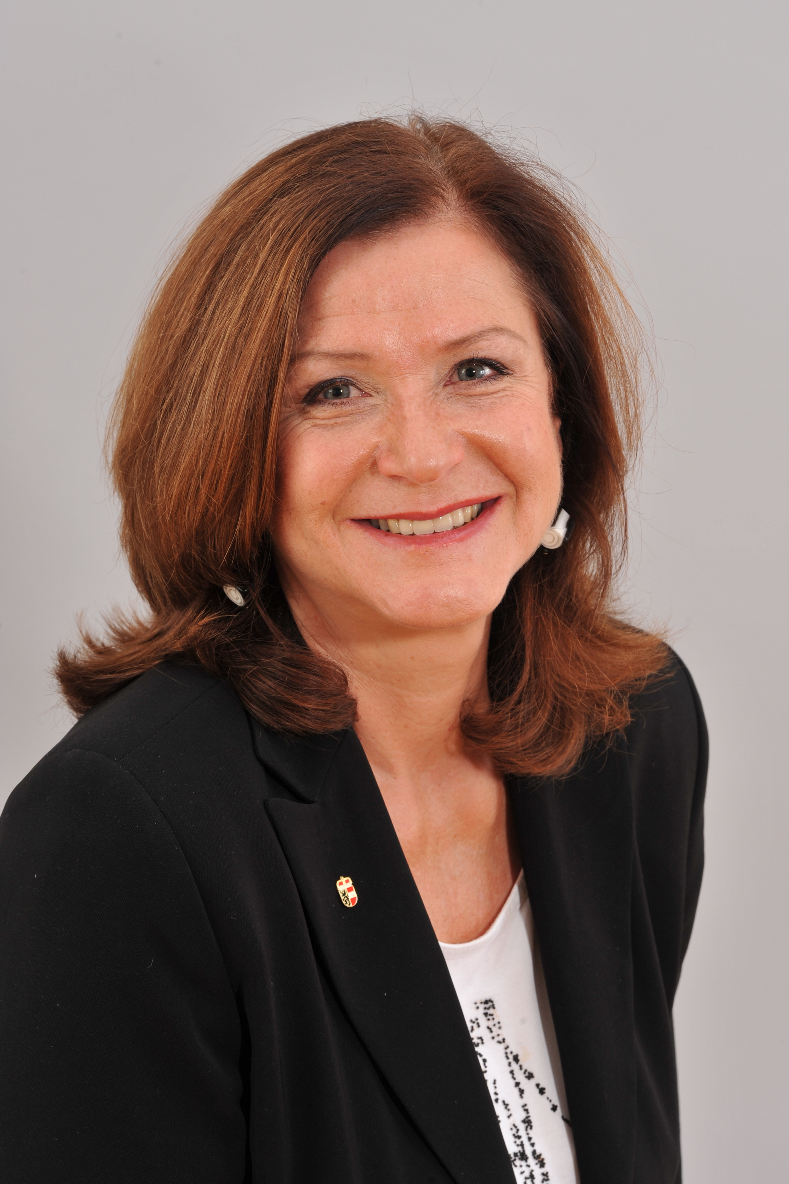 Landtagsprojekt Salzburg: Gudrun Mosler-Törnstrom